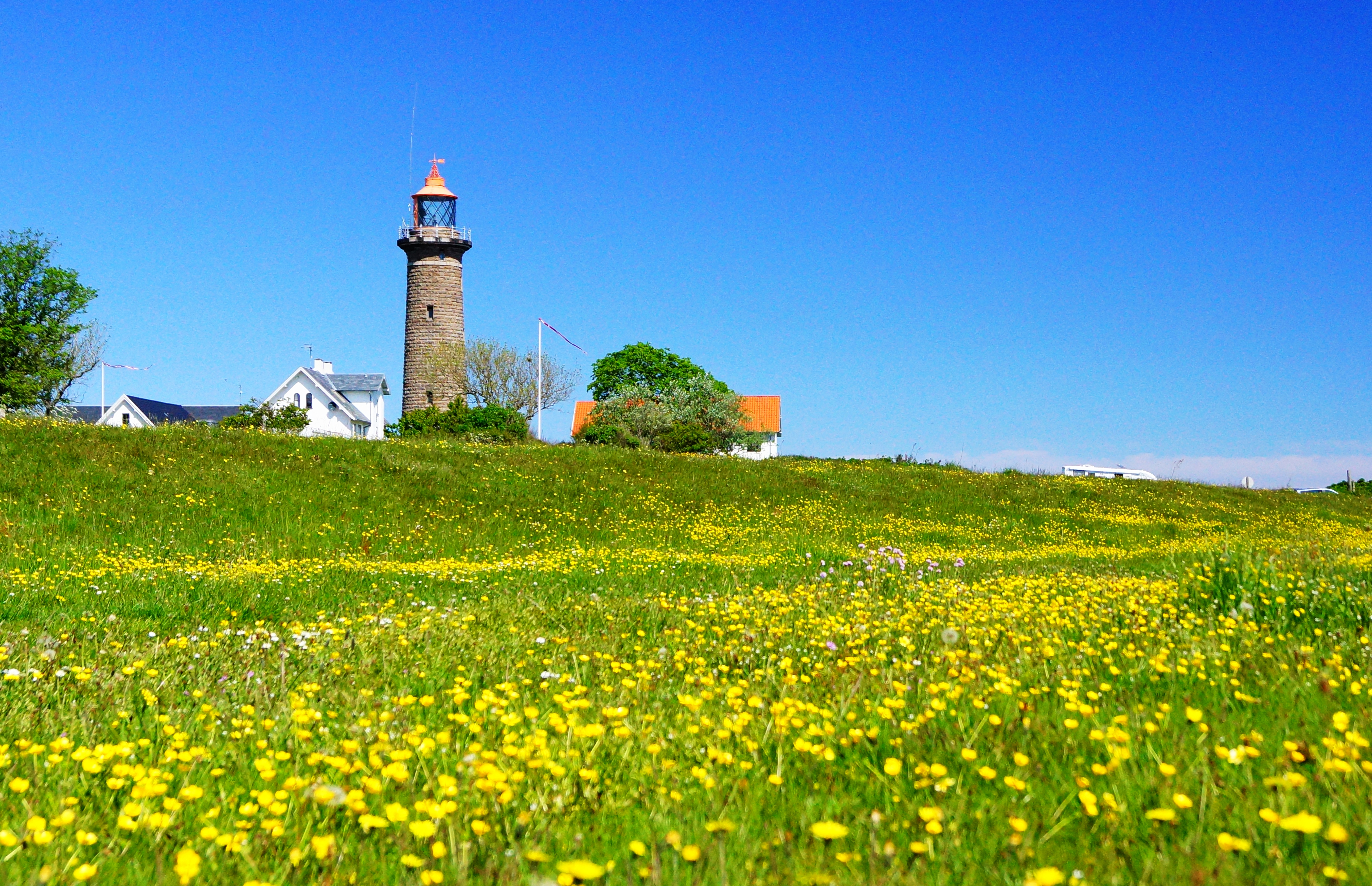 Fornæs Fyr, blomstereng